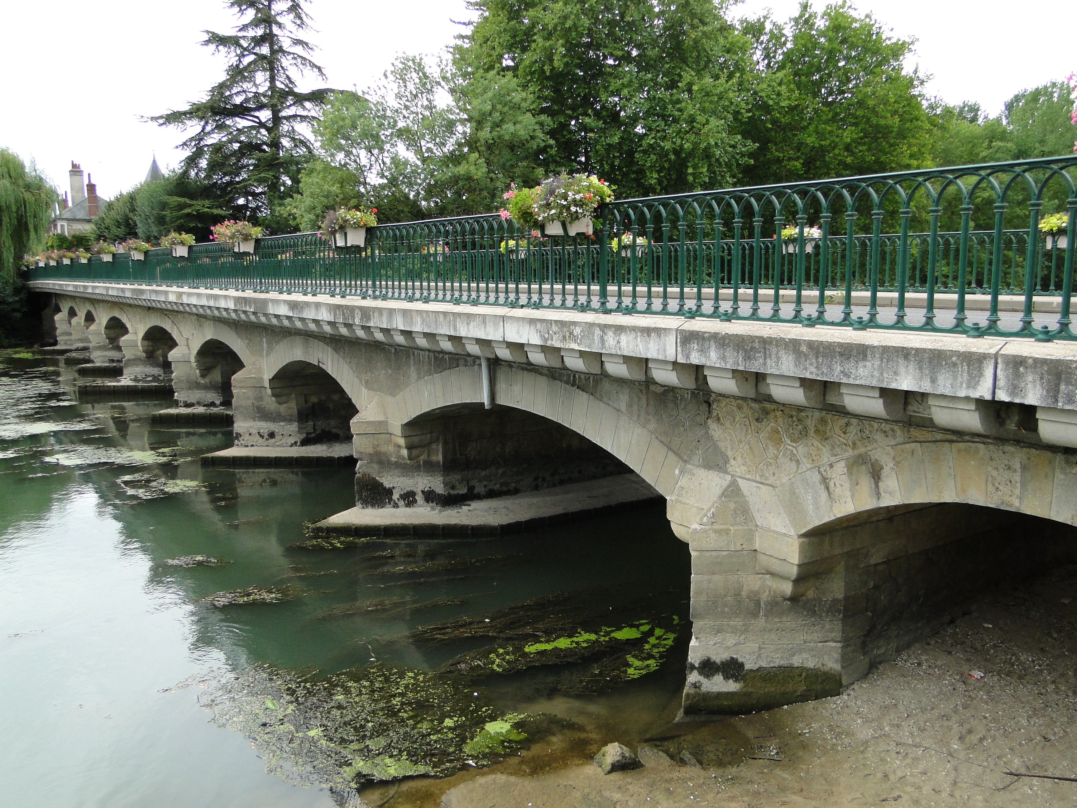 Pont de Pont-de-Ruan (Indre-et-Loire)